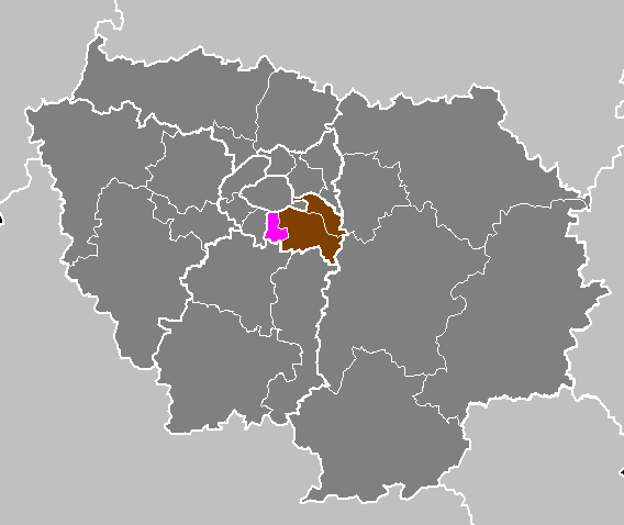 Maps of arrondissements and cantons of France: Département du Val-de-Marne - Arrondissement de l Hay-les-Roses.PNG (Région Île-de-France)